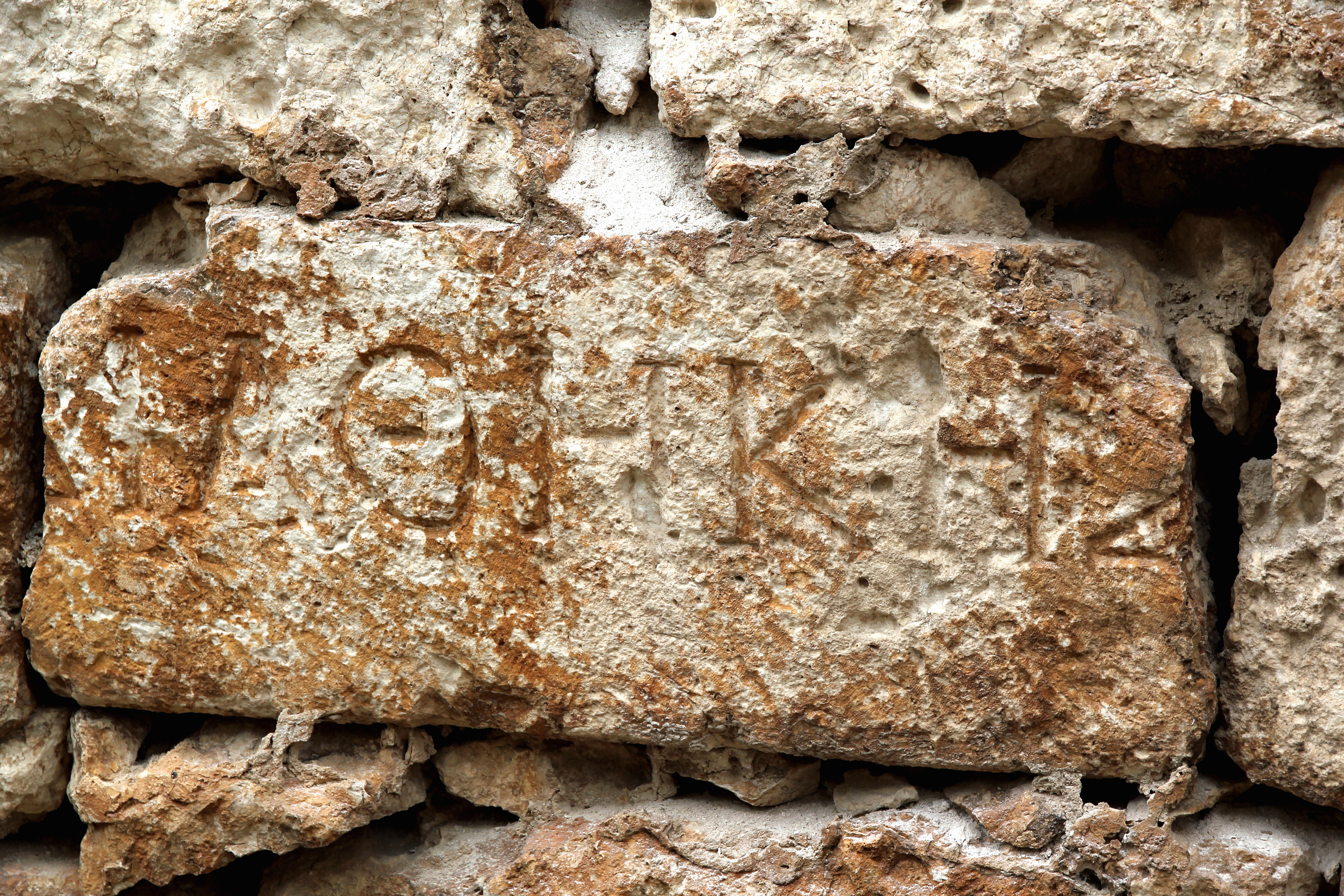 Korykos, Landburg bei Kızkalesi, Südtürkei, Inschrift von einem Sarkophag (θΗΚΉ) als Spolie in der östlichen Außenmauer